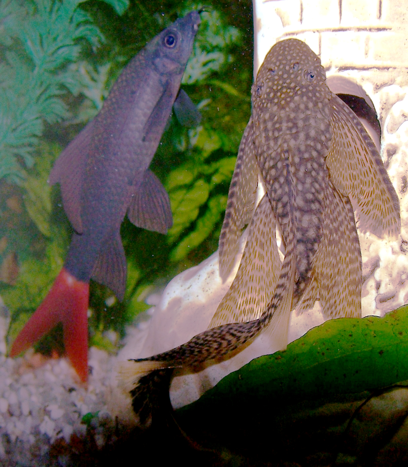 Ancistrus a pinne lunghe pesce di fondale d'acqua dolce